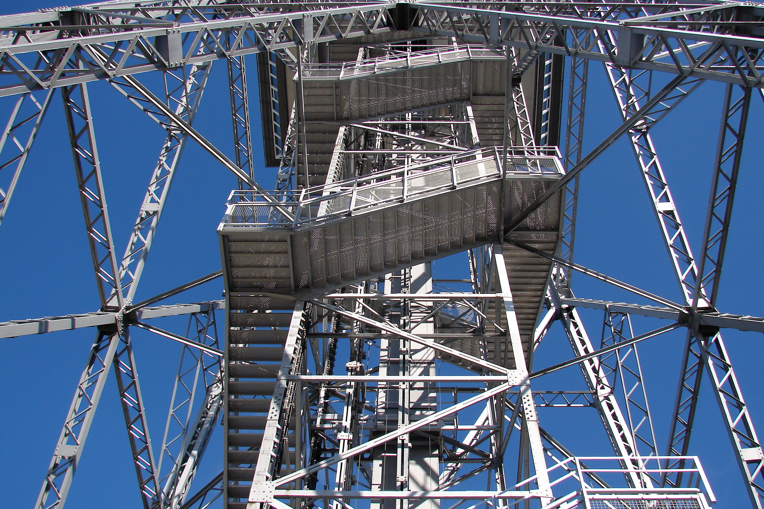 Der Berliner Funkturm ist ein 146,7 Meter hoher Stahlfachwerkturm auf dem Messegelände in Berlin.